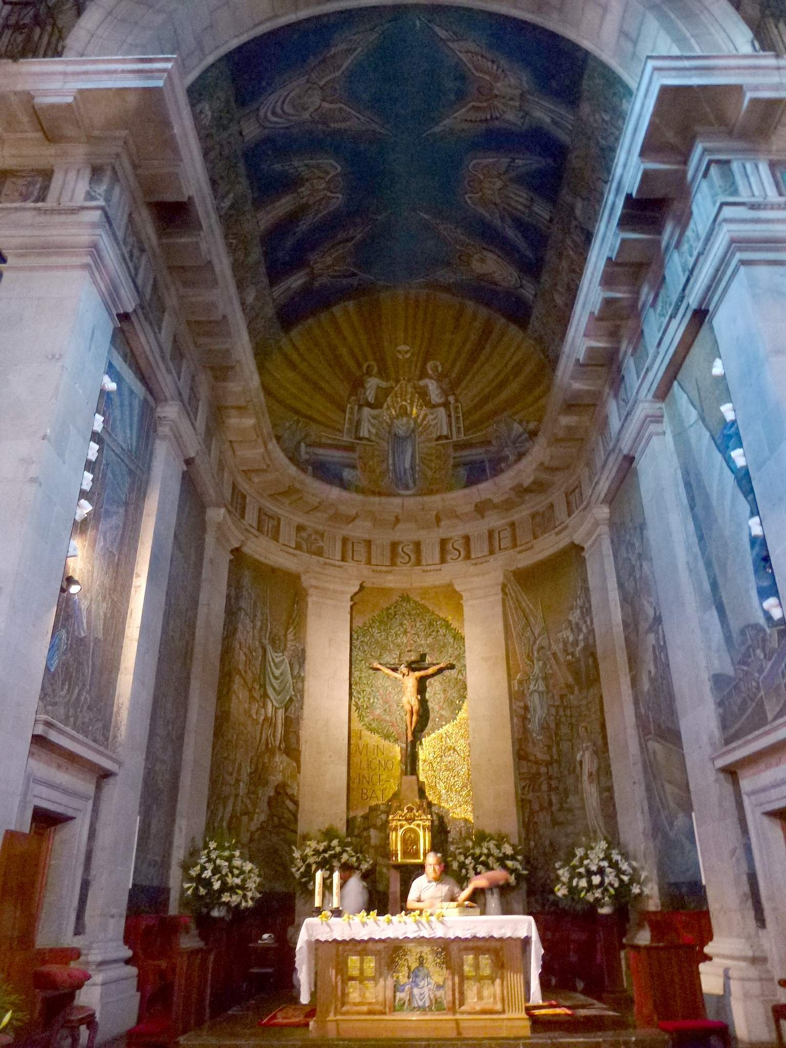 Vigo - Concatedral de Santa María, interiores